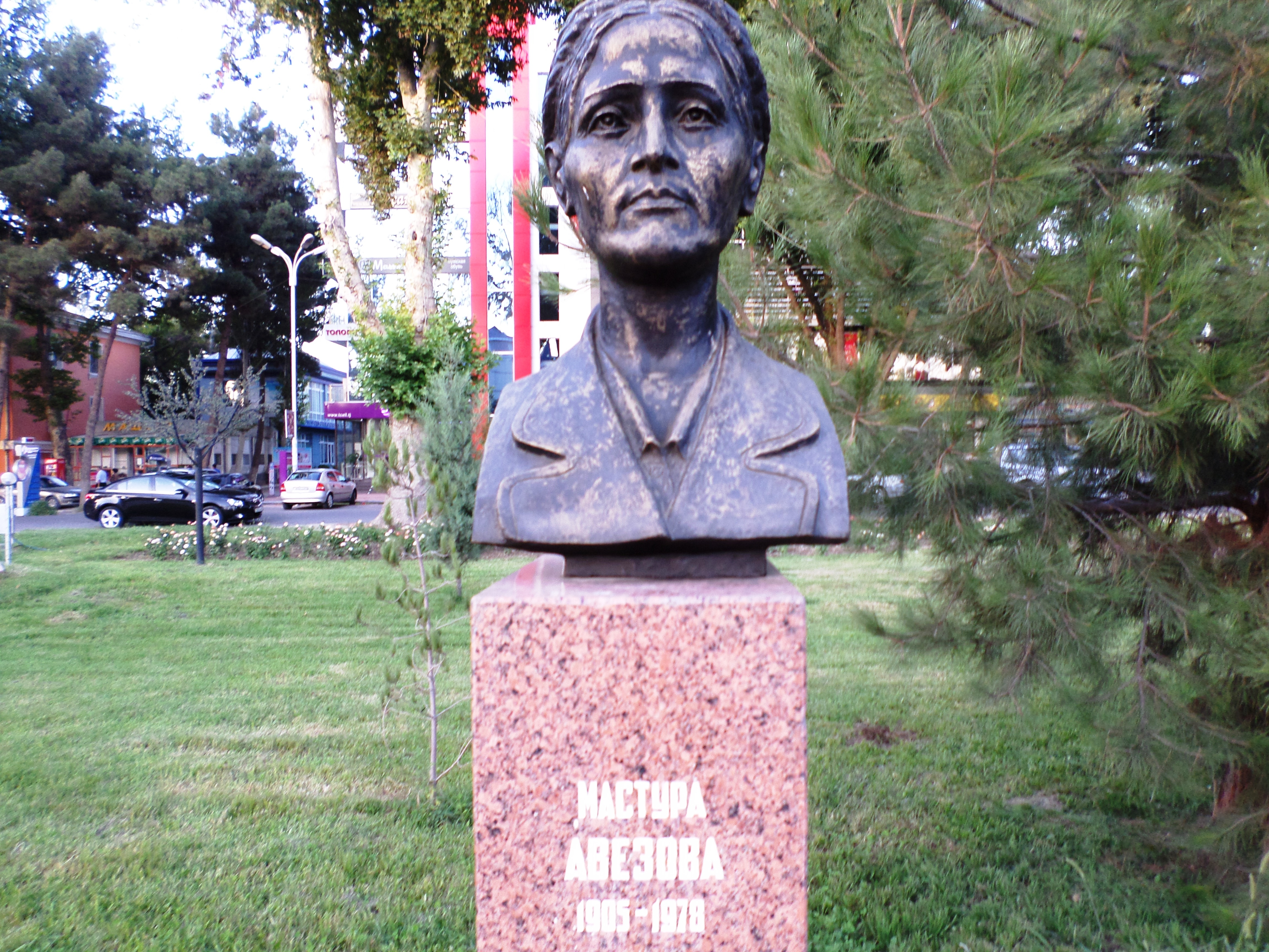 Авезова Мастура - государственный и партийный деятель Таджикской ССРТоҷикӣ: Авезова Мастура - Ходими давлатӣ ва ҳизбии ҶШС Тоҷикистон